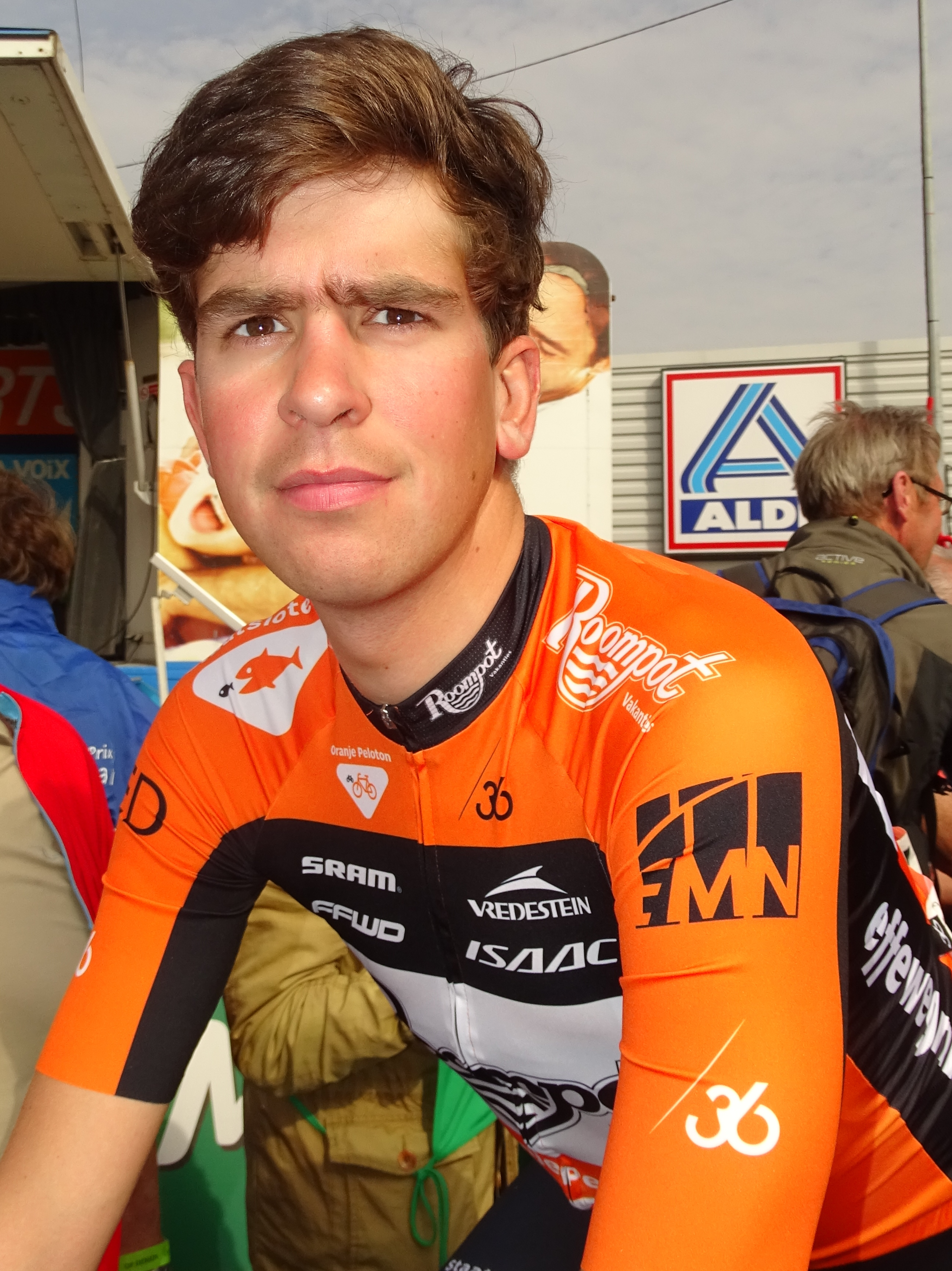 Reportage réalisé le jeudi 16 avril à l'occasion du départ et de l'arrivée du Grand Prix de Denain 2015 à Denain, Nord, Nord-Pas-de-Calais, France.